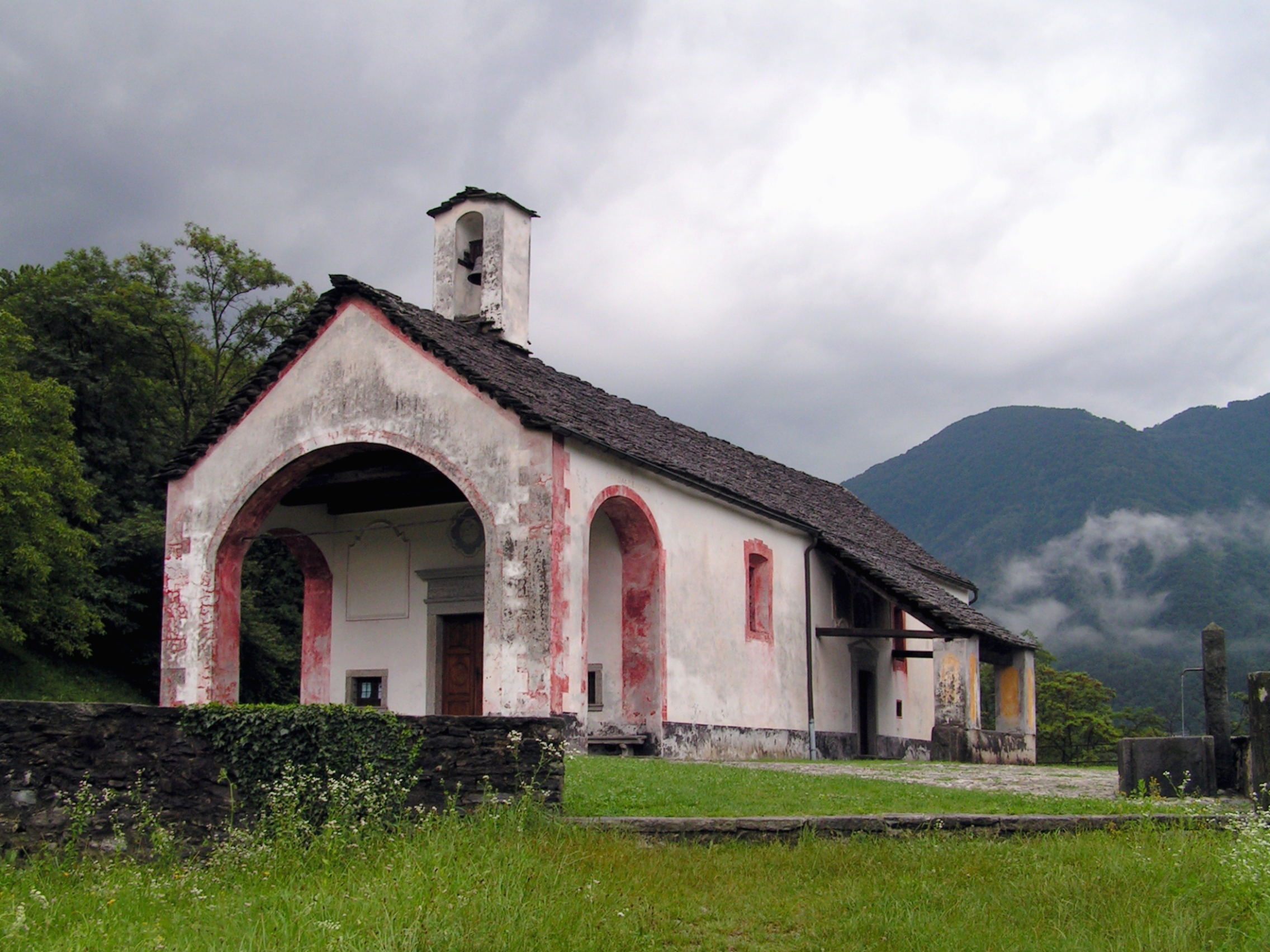 Via Cantonale Vecchia, Maggia. Église de Santa Maria delle Grazie in Campagna.